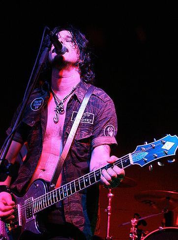 En bild på gitarristen Gilby Clarke under ett gig i Barcelona, Spanien.